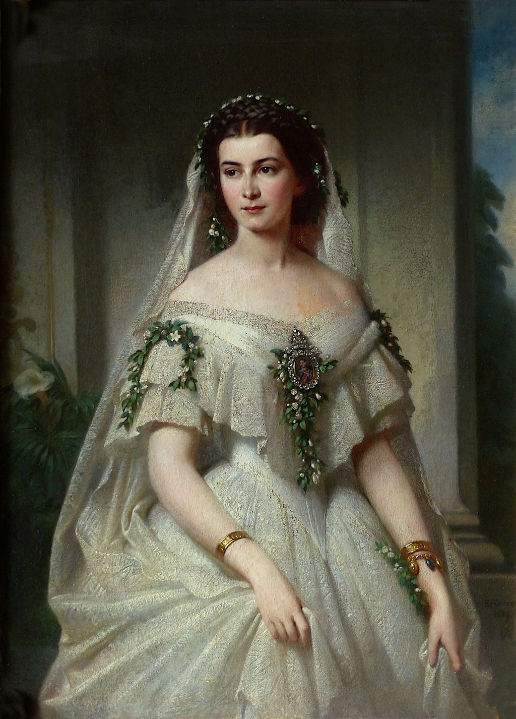 Sisis jüngere Schwester Marie als Braut des Kronprinzen Francesco beider Sizilien (Medaillon), Gemälde von 1859, Privatbesitz.